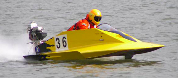 Motorbootrennen Lorch am Rhein 2003 eigenes Foto